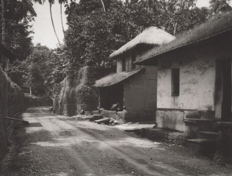 മൂദിബിദ്രി. മലബാറിലെ ഒരു തെരുവ്.